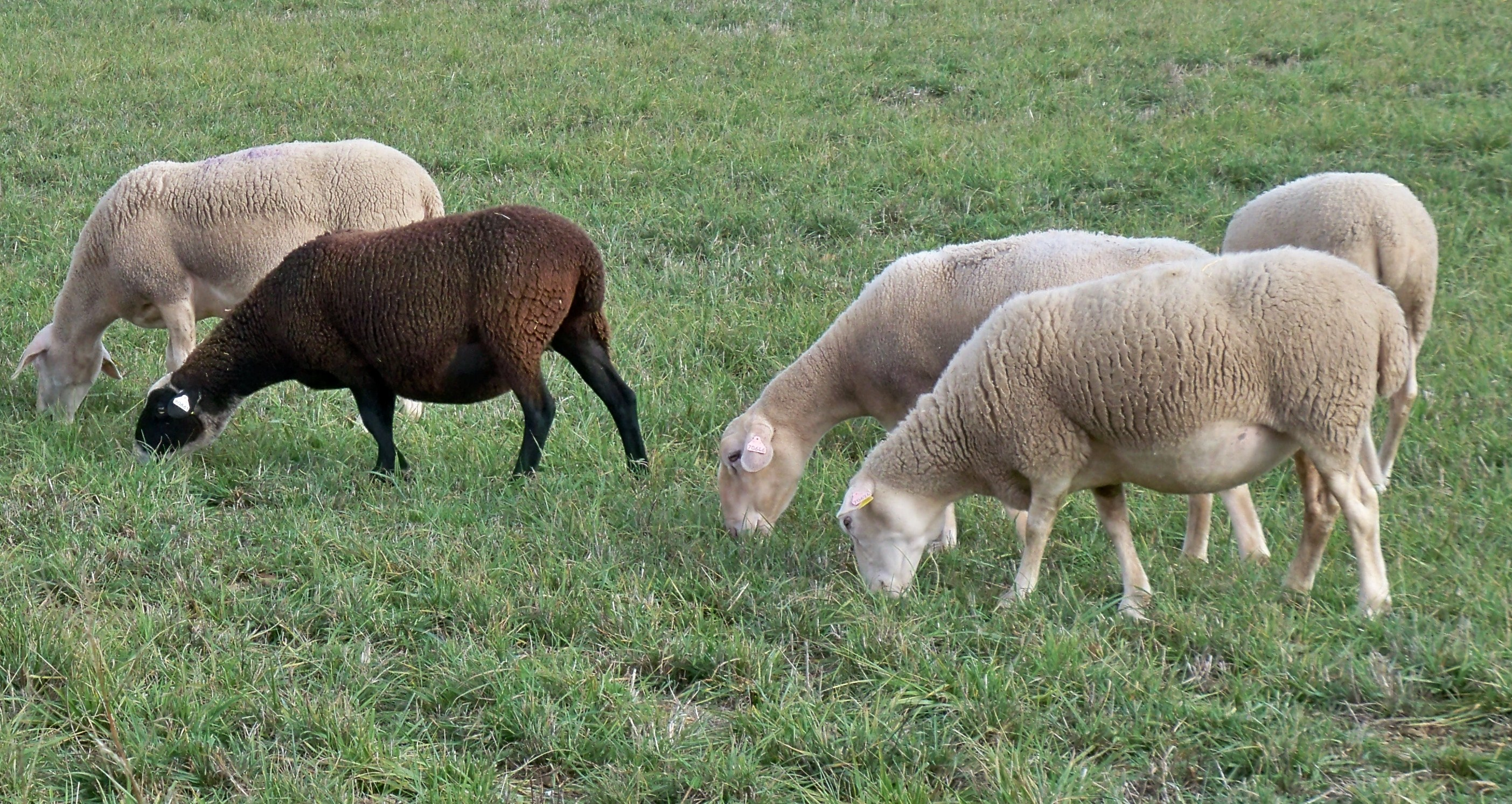 Brebies à Revest du Bion (04)